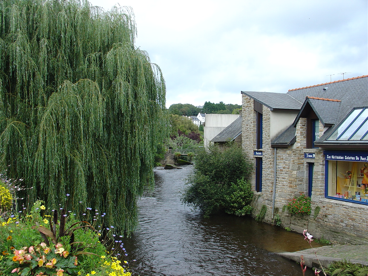 Vista di Pont-Aven